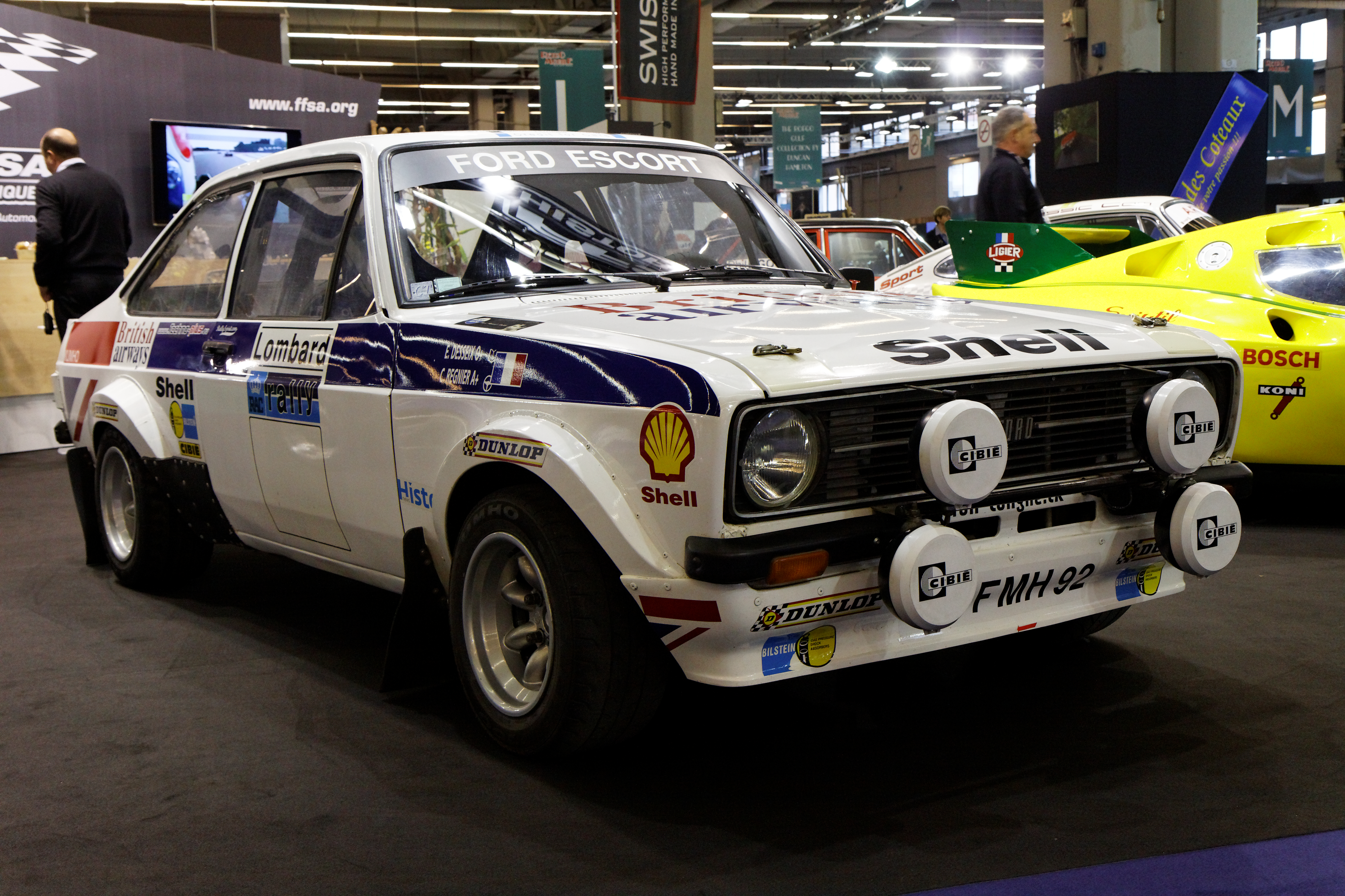 Photographie prise lors du salon rétromobile 2011 à Paris, porte de Versailles.